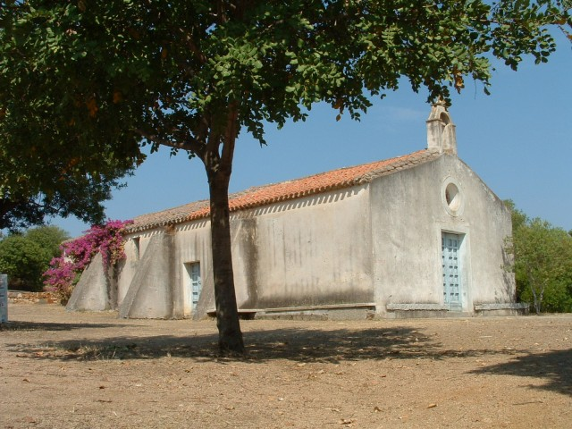 Autore: Fabrizio Muggianu, Fotografia della chiesa di S.Antonio da Padova nel parco di Mullò a Triei, licenza cc-by.